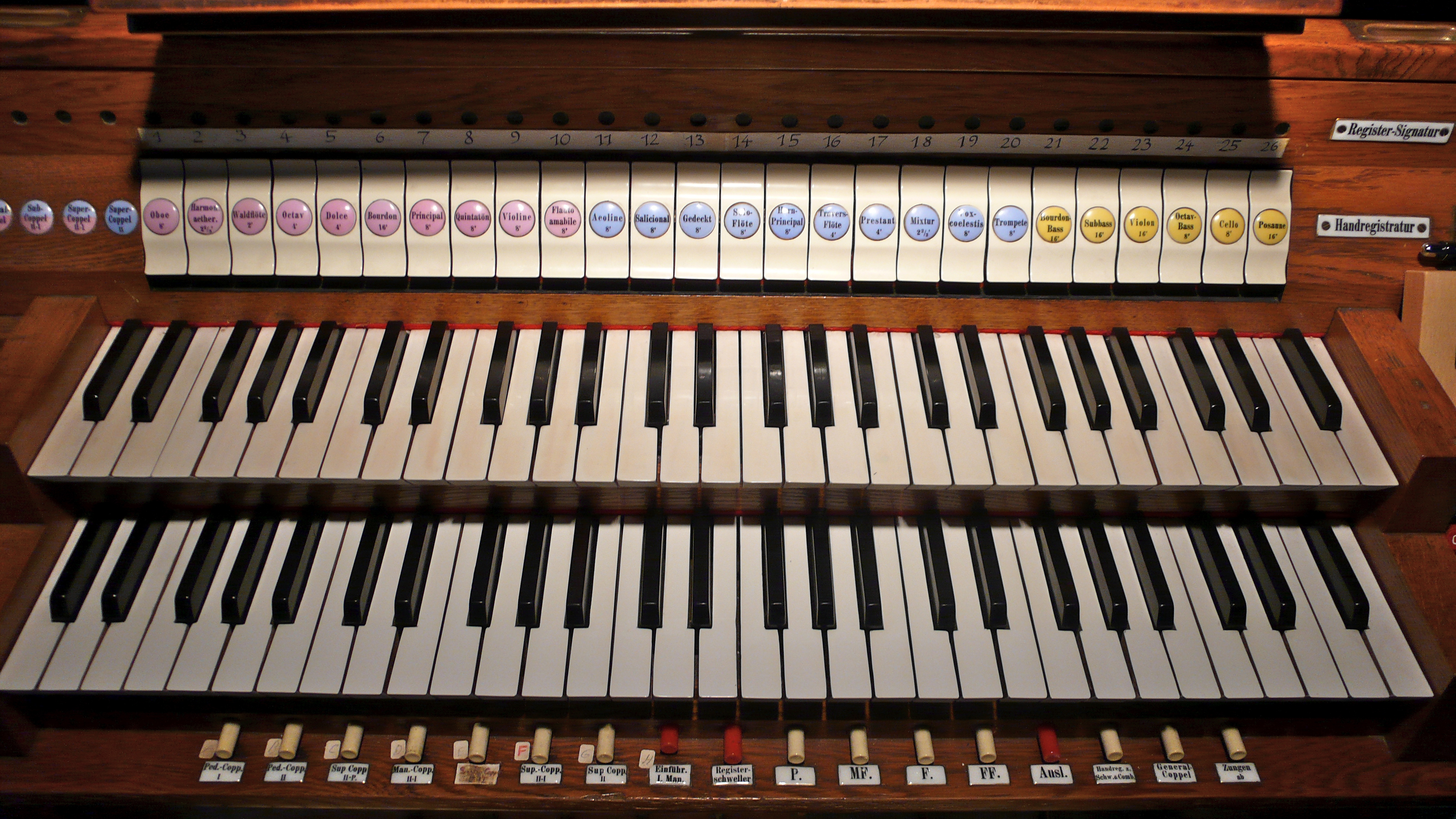 Spieltisch der Siemann-Orgel in St. Nikolaus (Übersee)